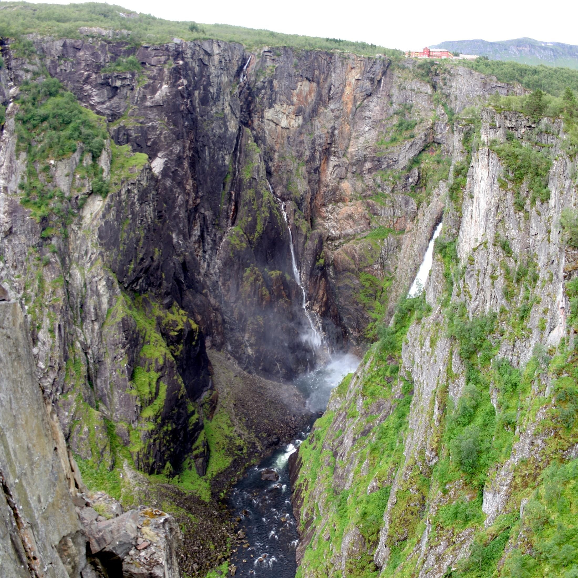 Fossli Hotel ved Vøringsfossen